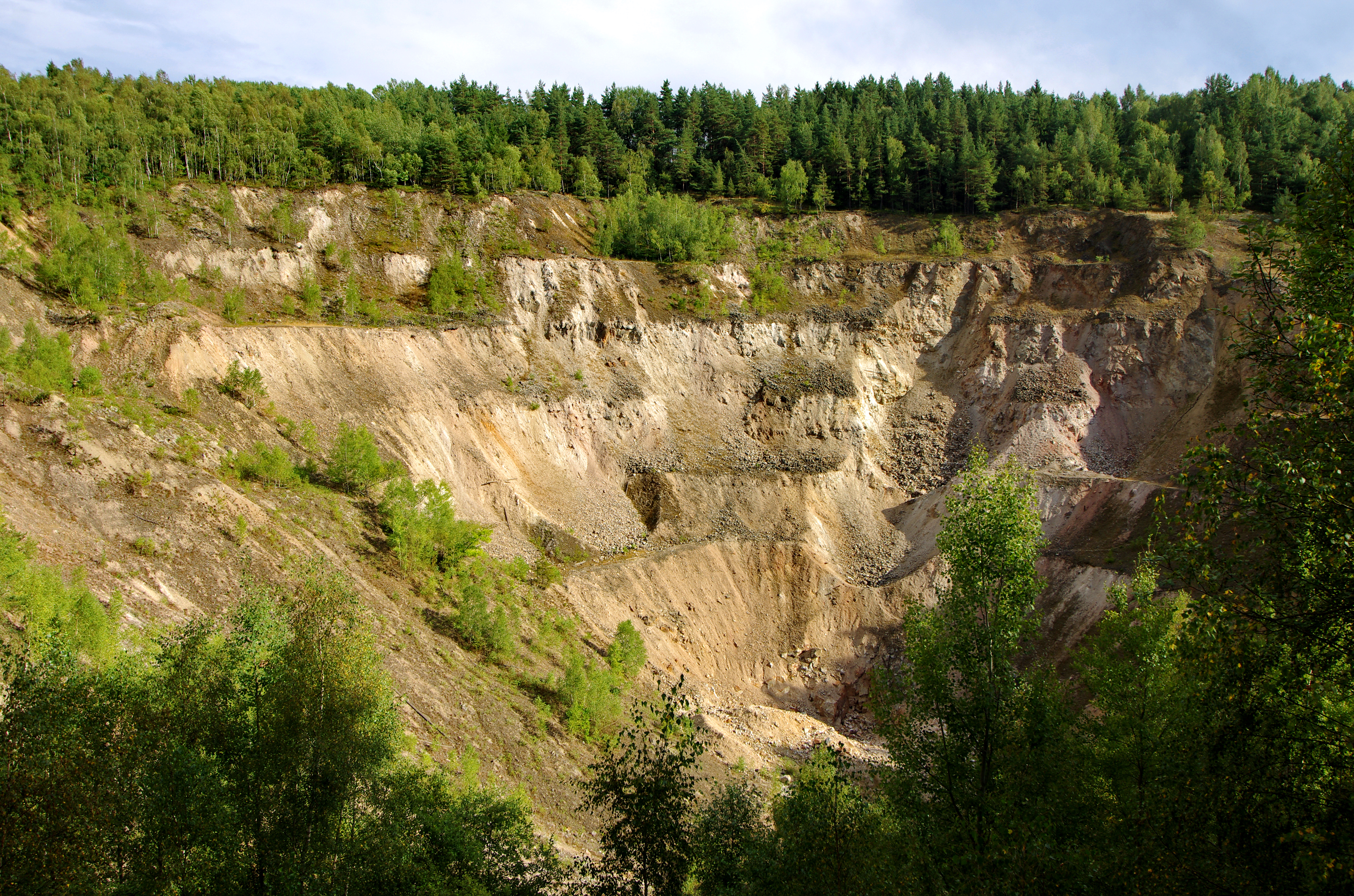 Krásno, Hubský peň, dolování cínowolframové rudy, okres Sokolov